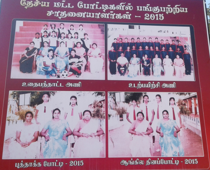 கல்லூரியின் தேசிய மட்ட போட்டிகள் - 2015